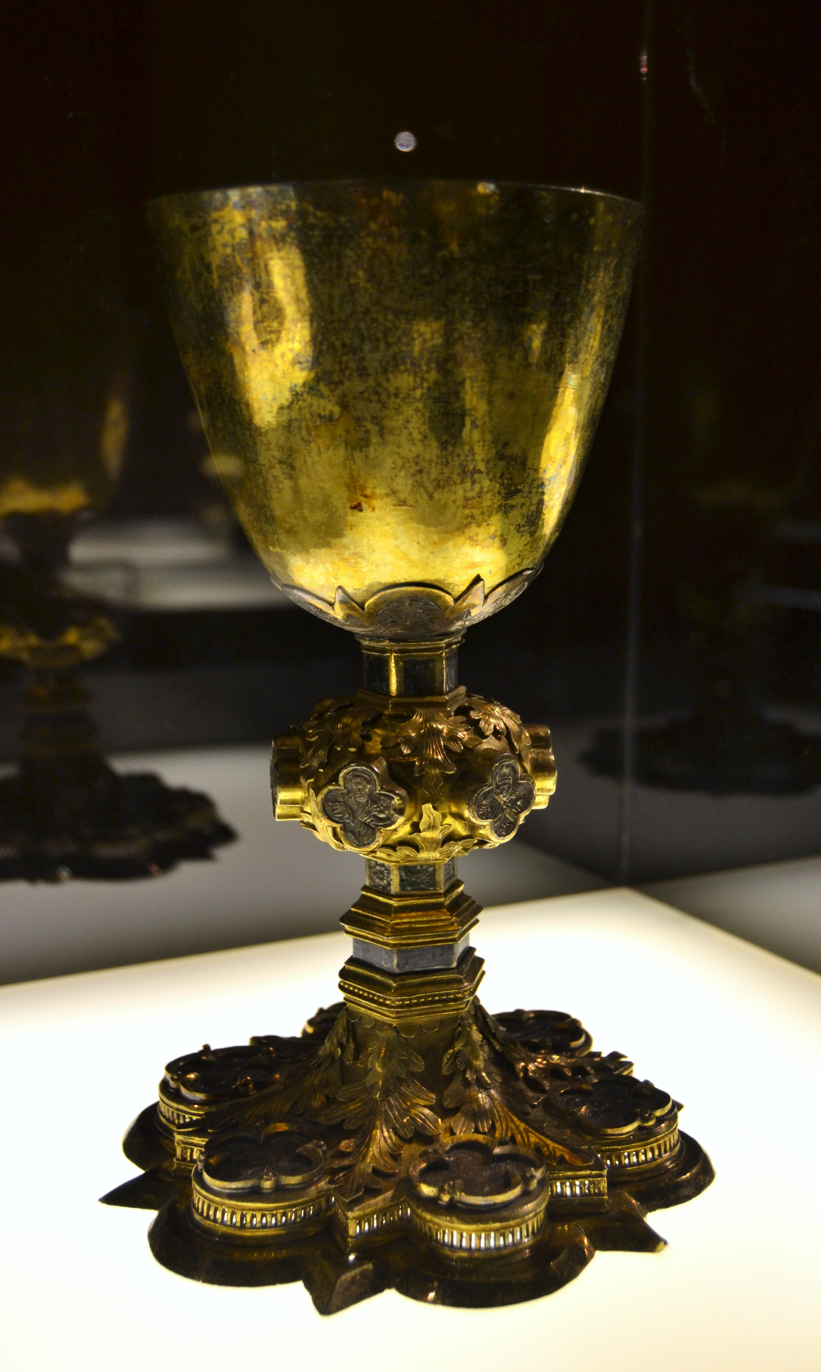 Calze del Papa Calixt III, c. 1435 - 1458, col·legiata de Xàtiva.